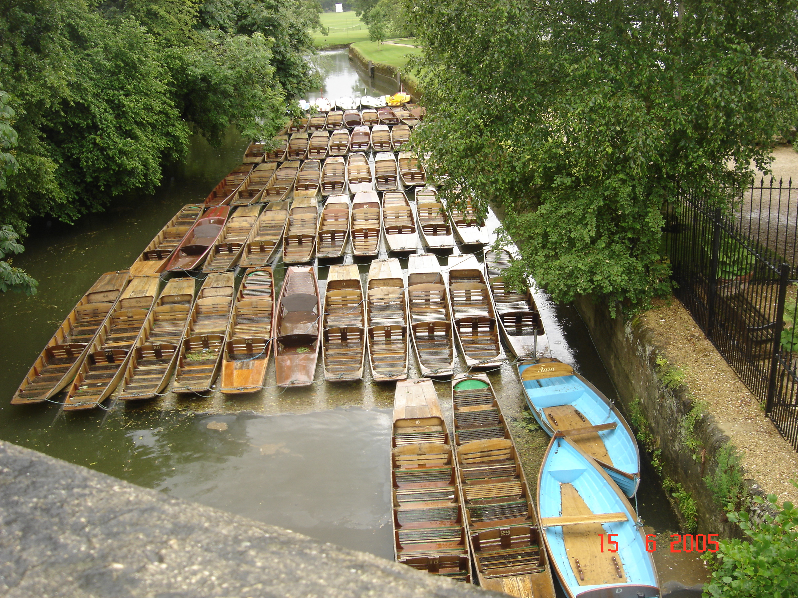 Boten